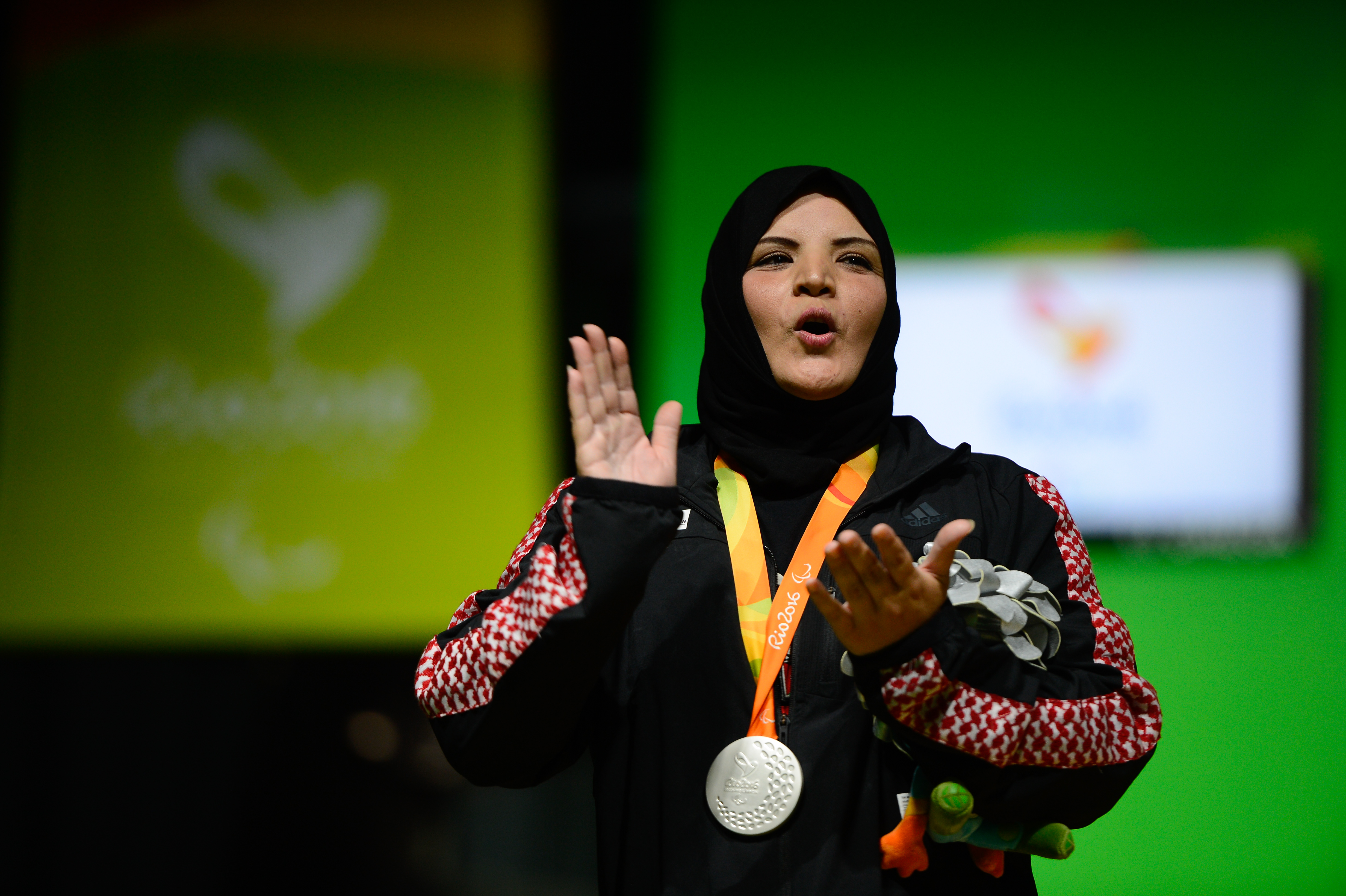 Rio de Janeiro - Tharwah Alhajaj, da Jordânia, prata na final feminina no levantamento de peso, categoria até 86 kg, nos Jogos Paralímpicos Rio 2016 (Fernando Frazão/Agência Brasil)